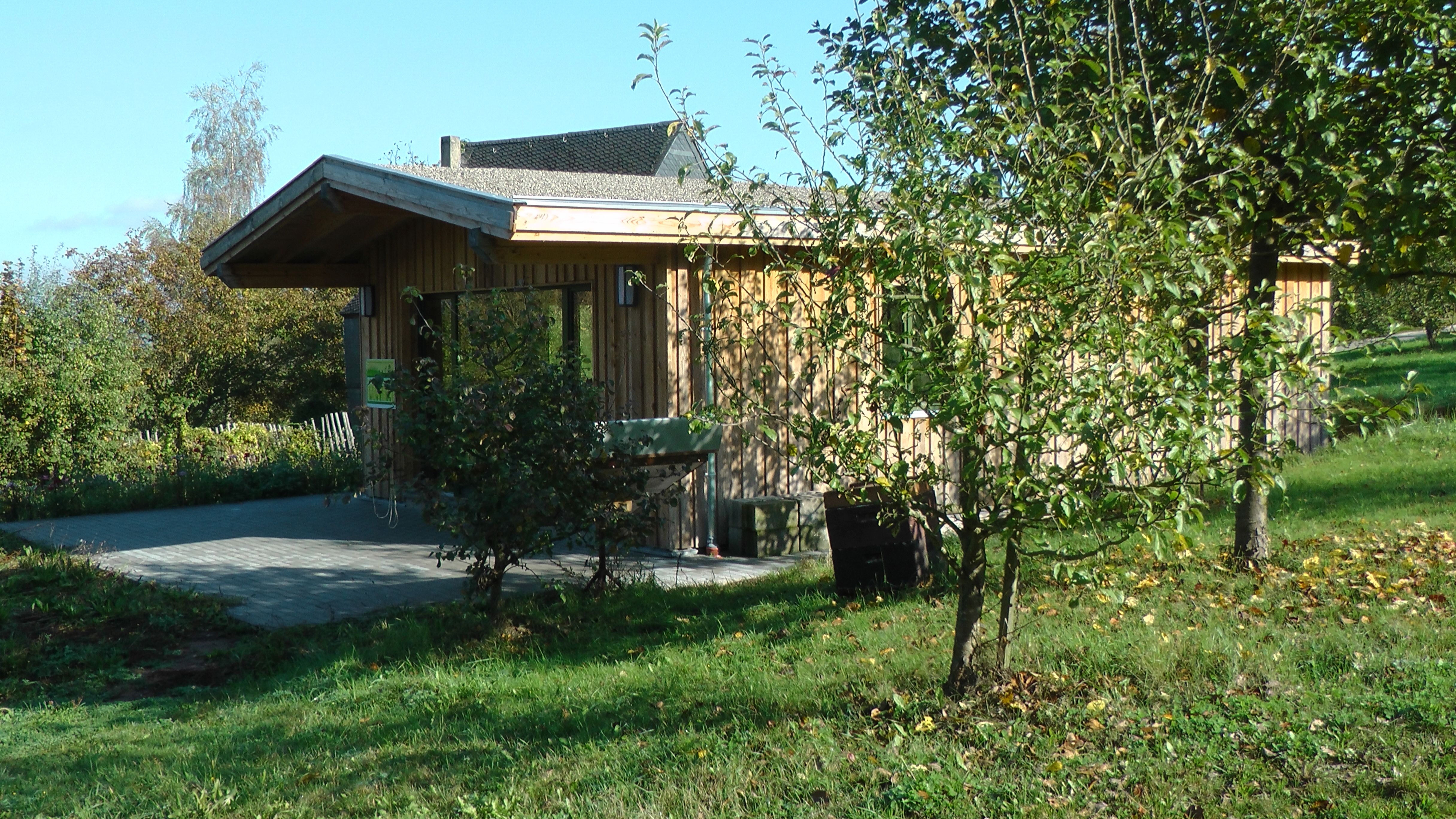 Lehrbienenstand des Imkervereins Konz